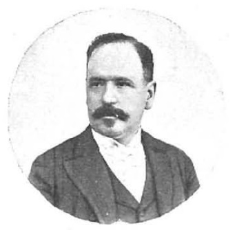 Sr. D. José Olavide. Doctor en MedicinaFOT. COMPAÑY